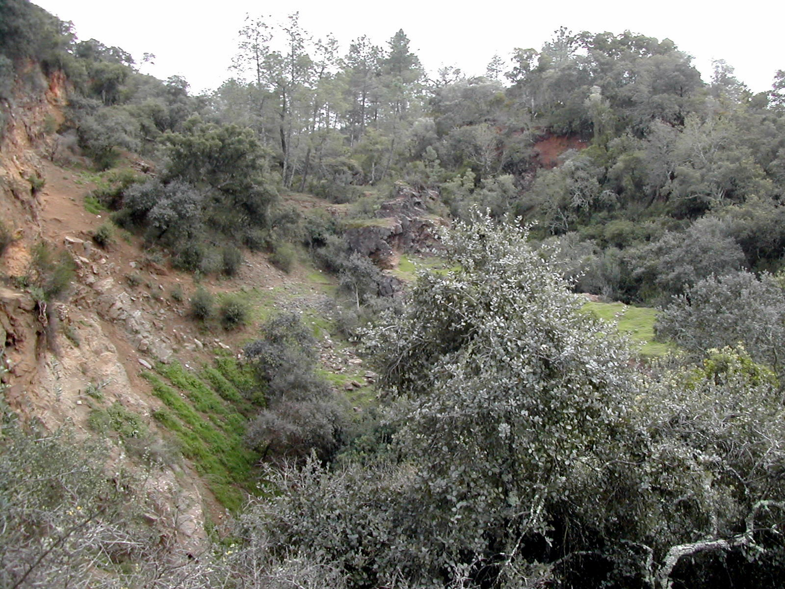 Interior da Corta Grande, Mina da Nogueirinha, Santiago do Escoural, Montemor-o-Novo